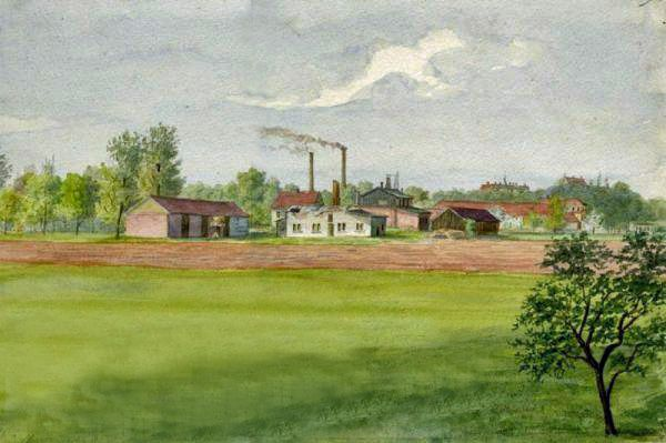 Von Bernhard Hüffer errichtete Ziegelei in Leipzig-Schleußig